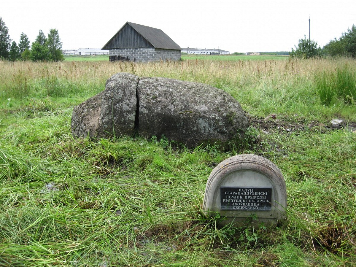 Старыя Паддубы. Старападдубенскі валун